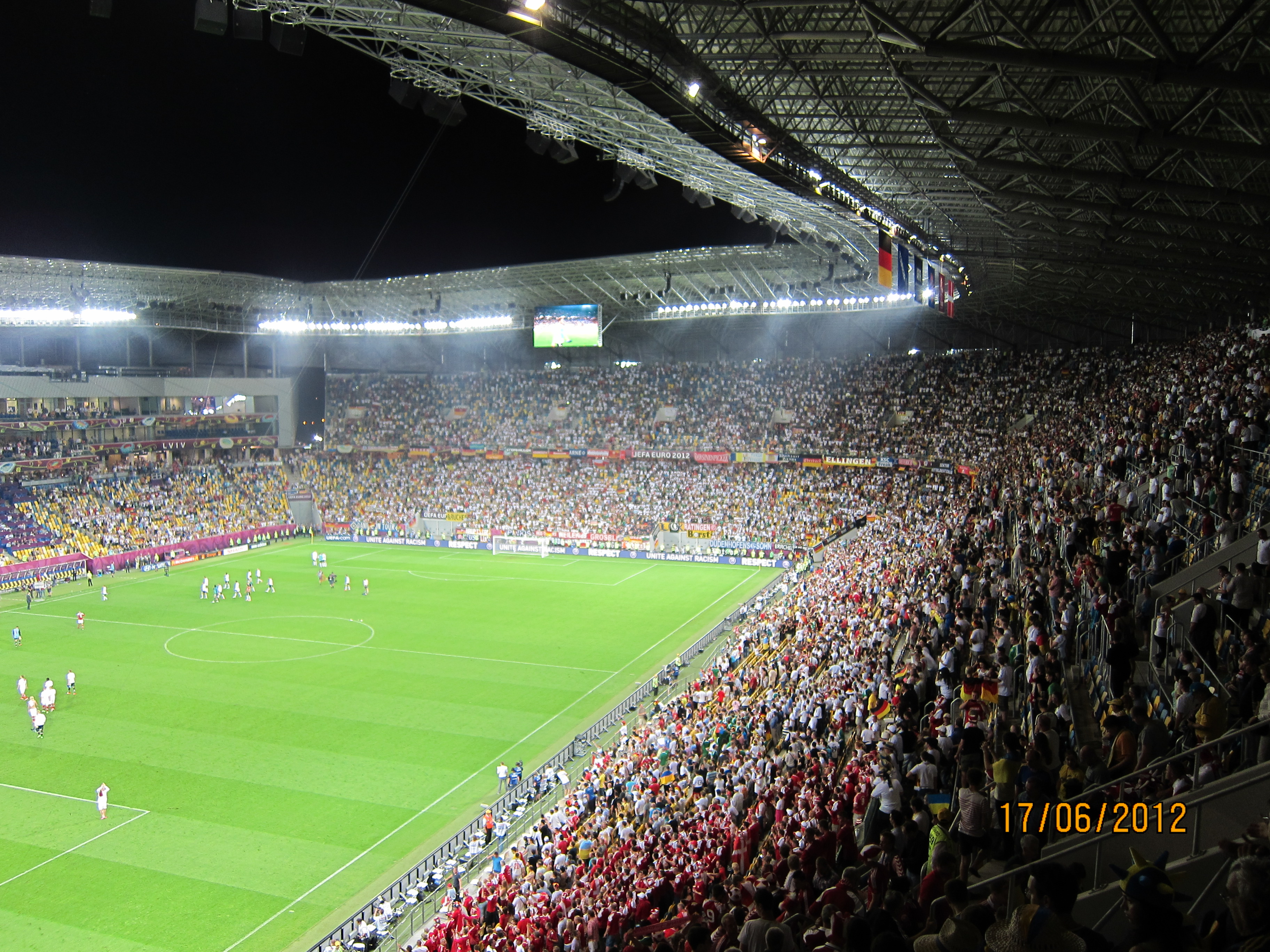 Арена Львів збудована завдяки Степану Лукашику